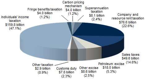 ภาพแสดงอัตราส่วนภาษีปี 2012-2013